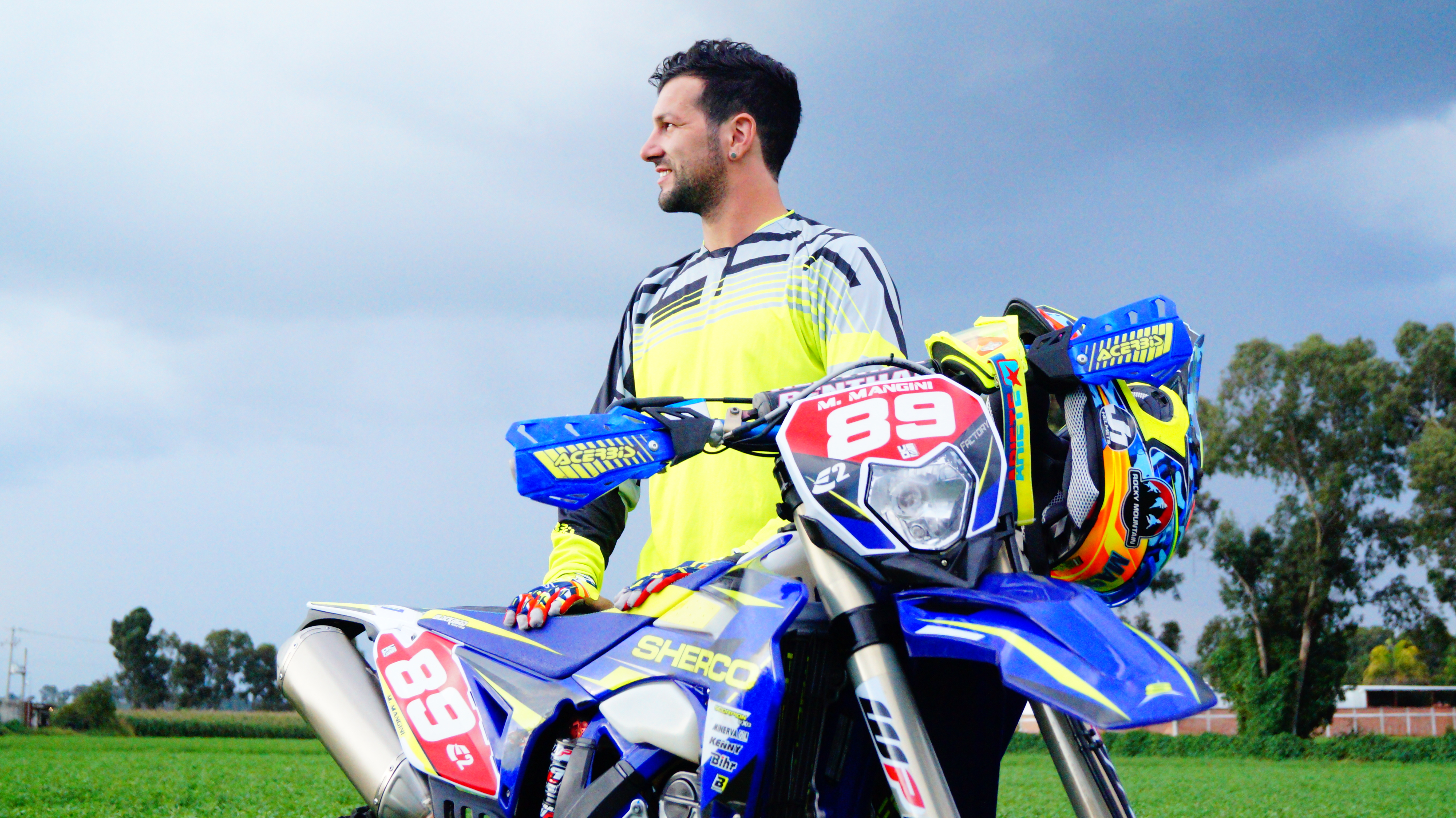 Piloto Profesional de Motocross